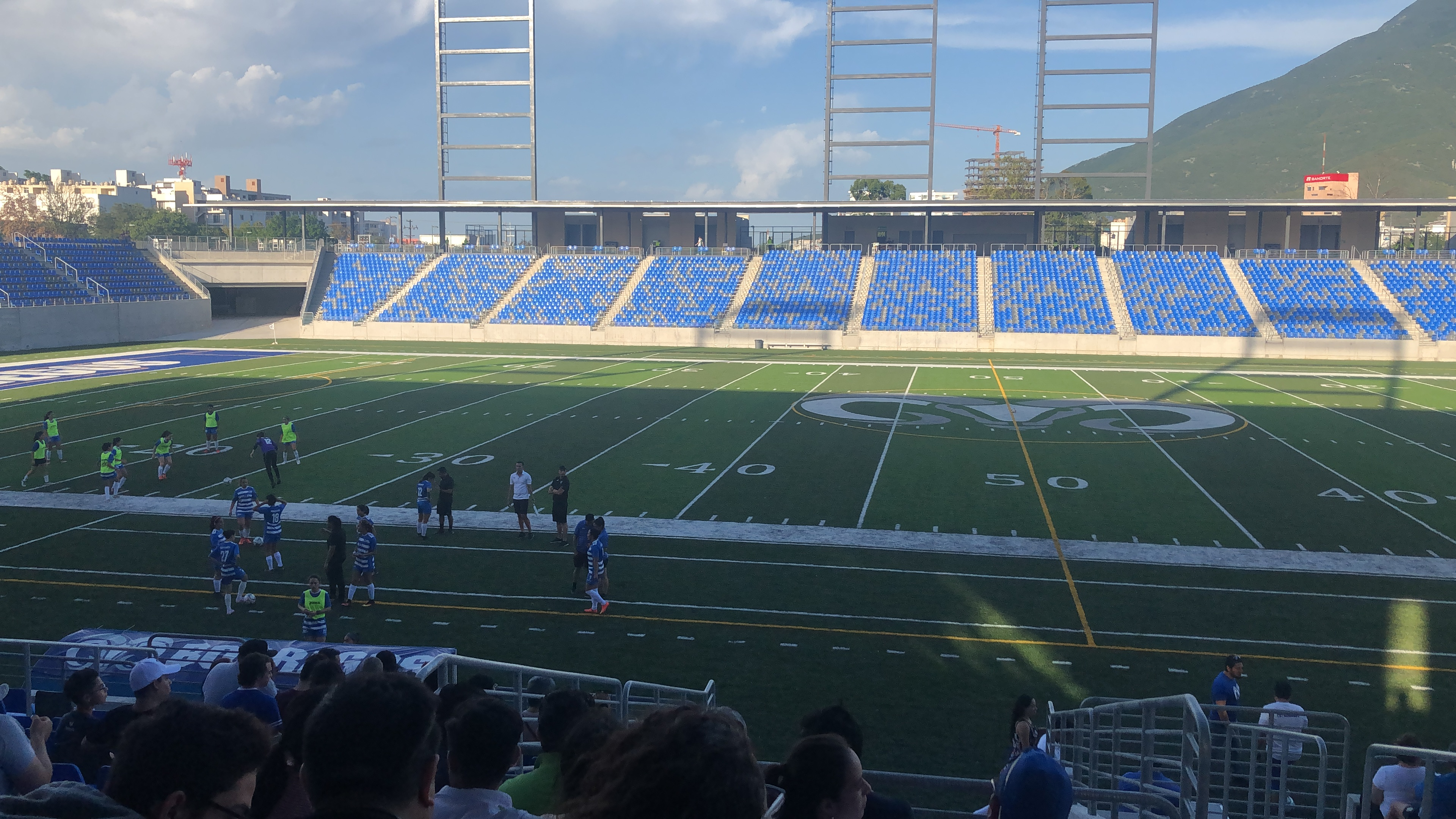 Estadio Borregos en el partido de pretemporada Arizona State vs Borregos, fútbol femenil.